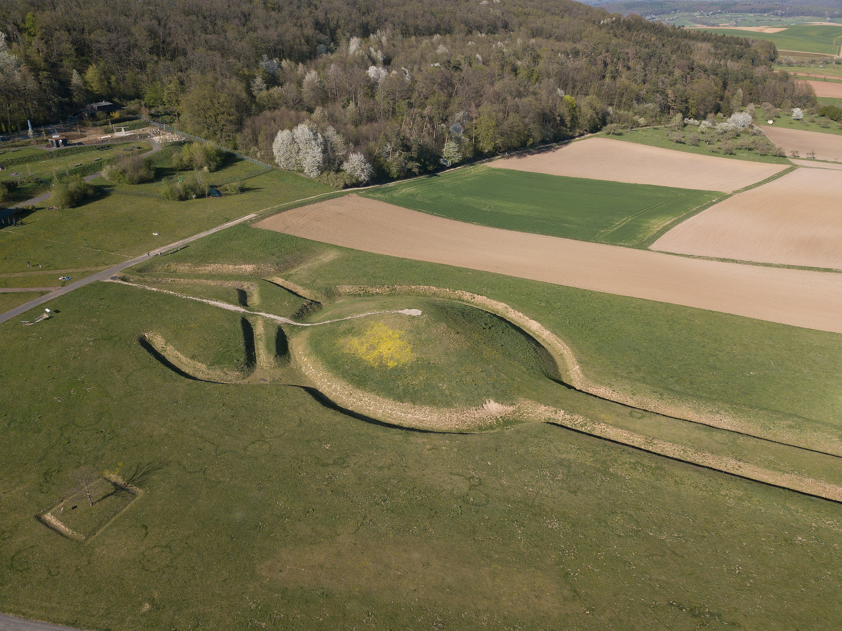 Grabhügel und Prozessionsstraße Keltenwelt am Glauberg, Glauburg